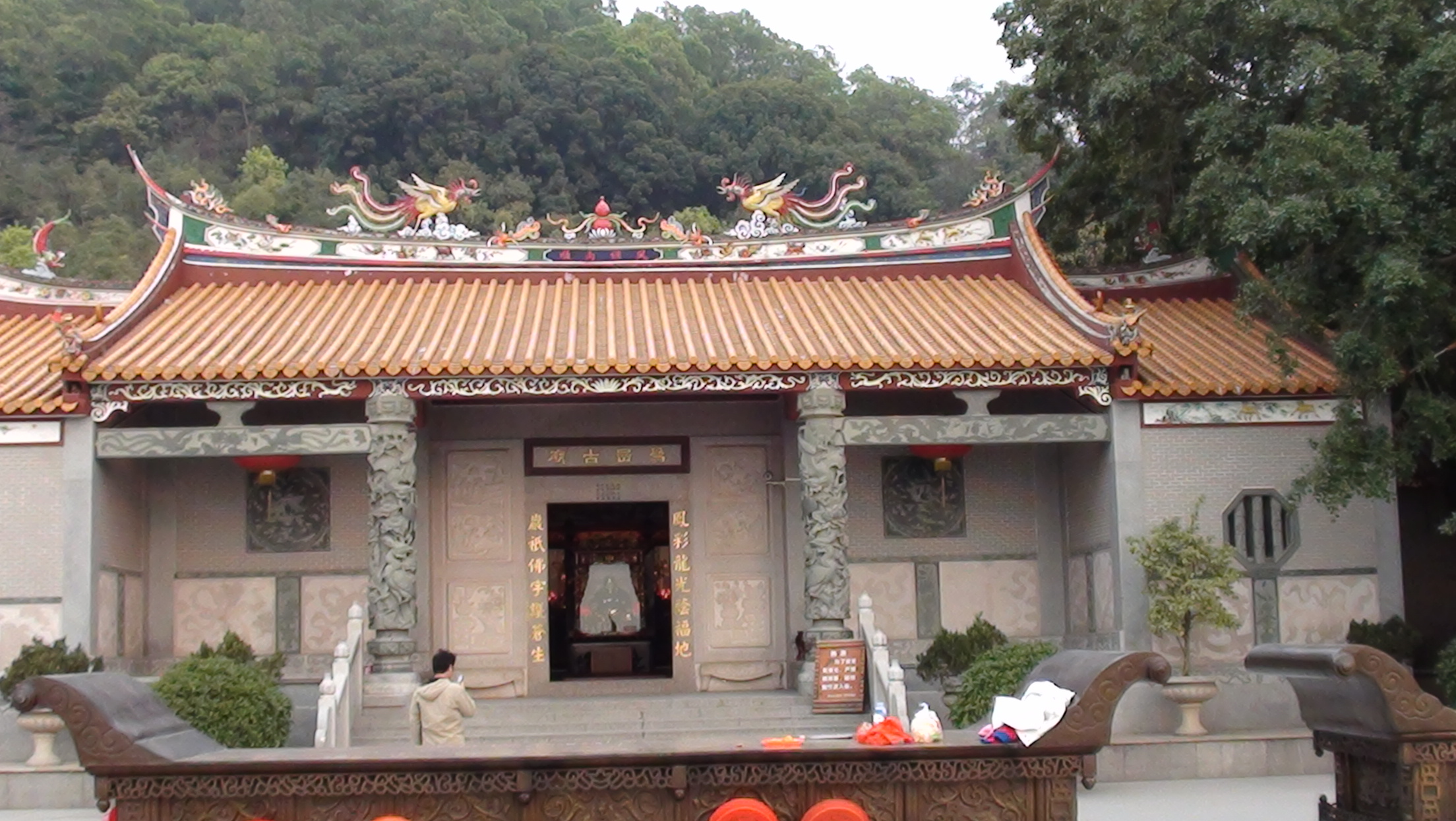 深圳宝安福永凤凰山之凤凰大庙